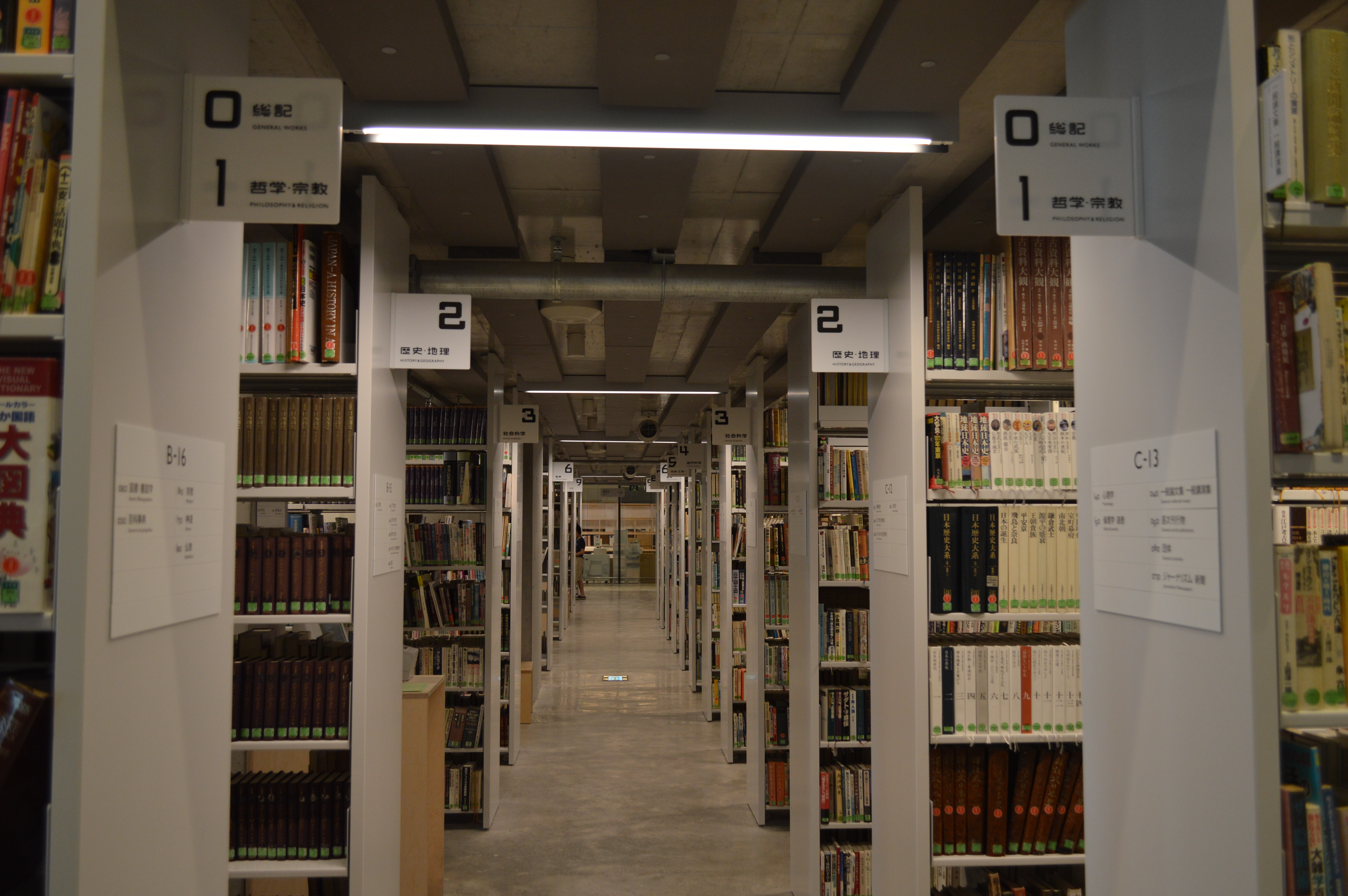 岐阜市のみんなの森 ぎふメディアコスモス1階。岐阜市立中央図書館の書庫。